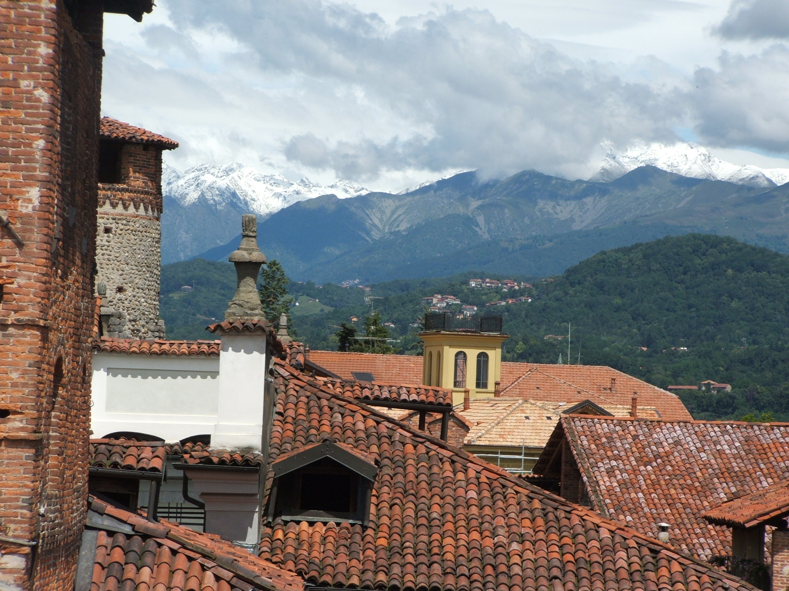 Candelo, provincia di Biella, Piemonte, Italia